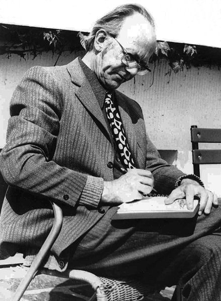 Herman Divendal schrijft zijn dagboek